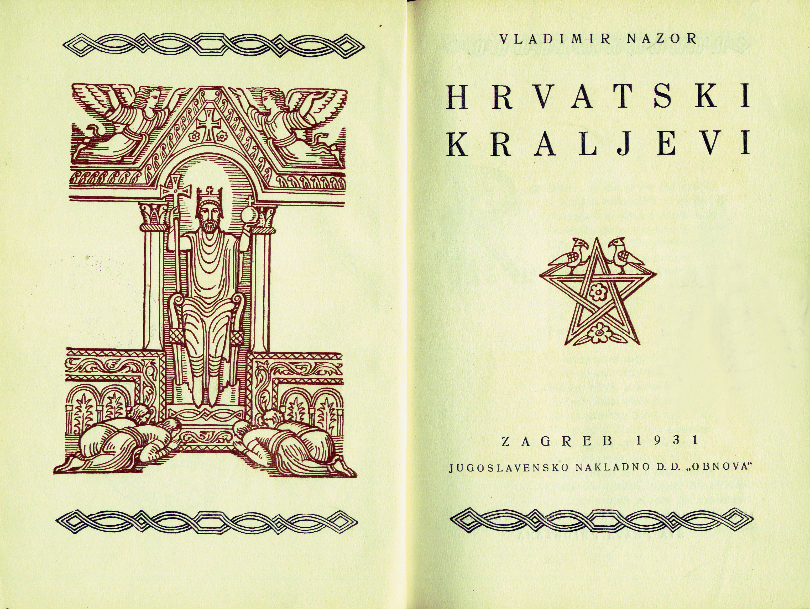 Dizajn Ljube Babića knjige Vladimira Nazora "Hrvatski kraljevi" iz 1931